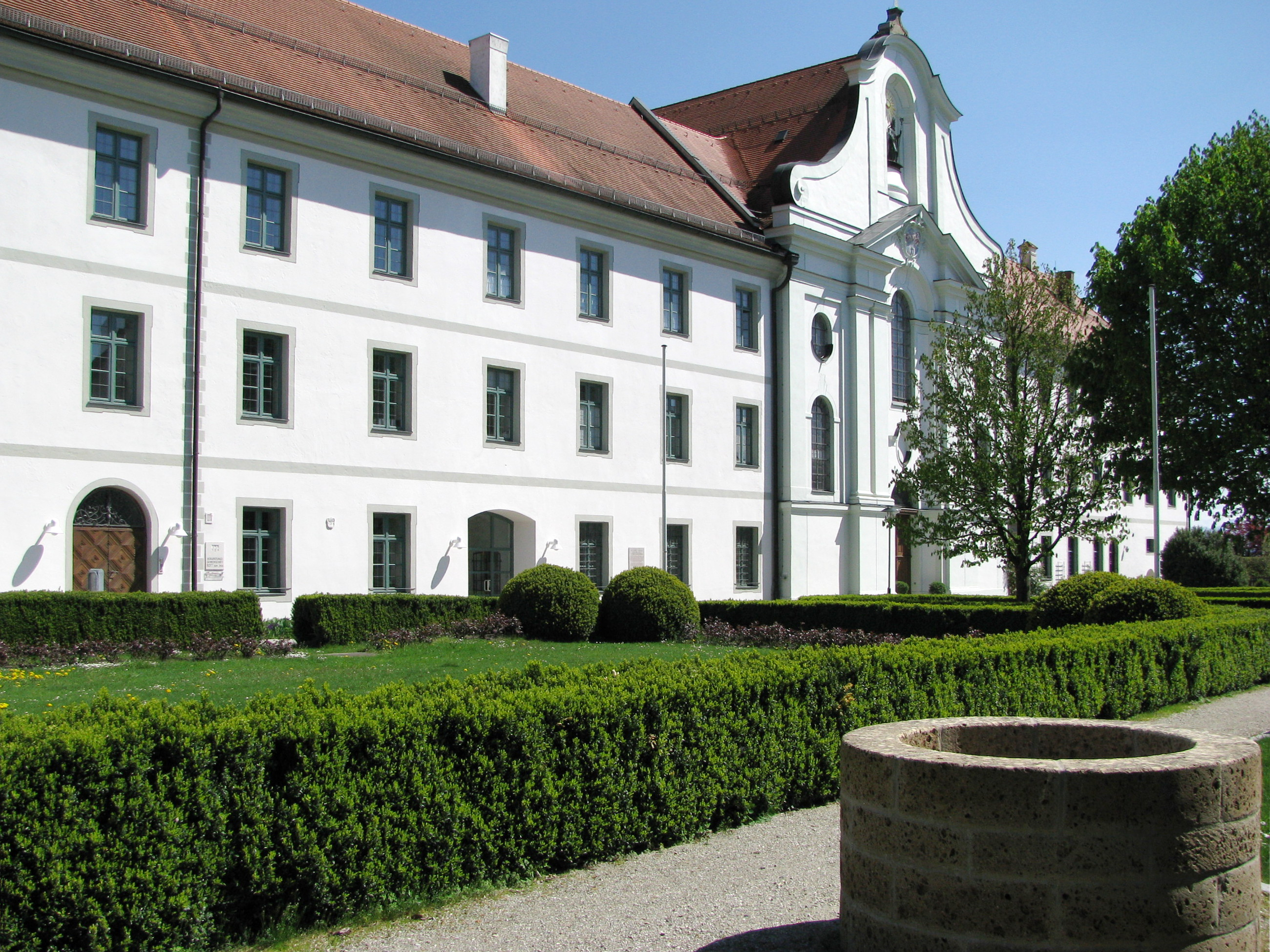 Ehemaliges Benediktinerkloster Rott; in dem Trakt links der Kirche befindet sich heute das Rathaus von Rott am Inn.